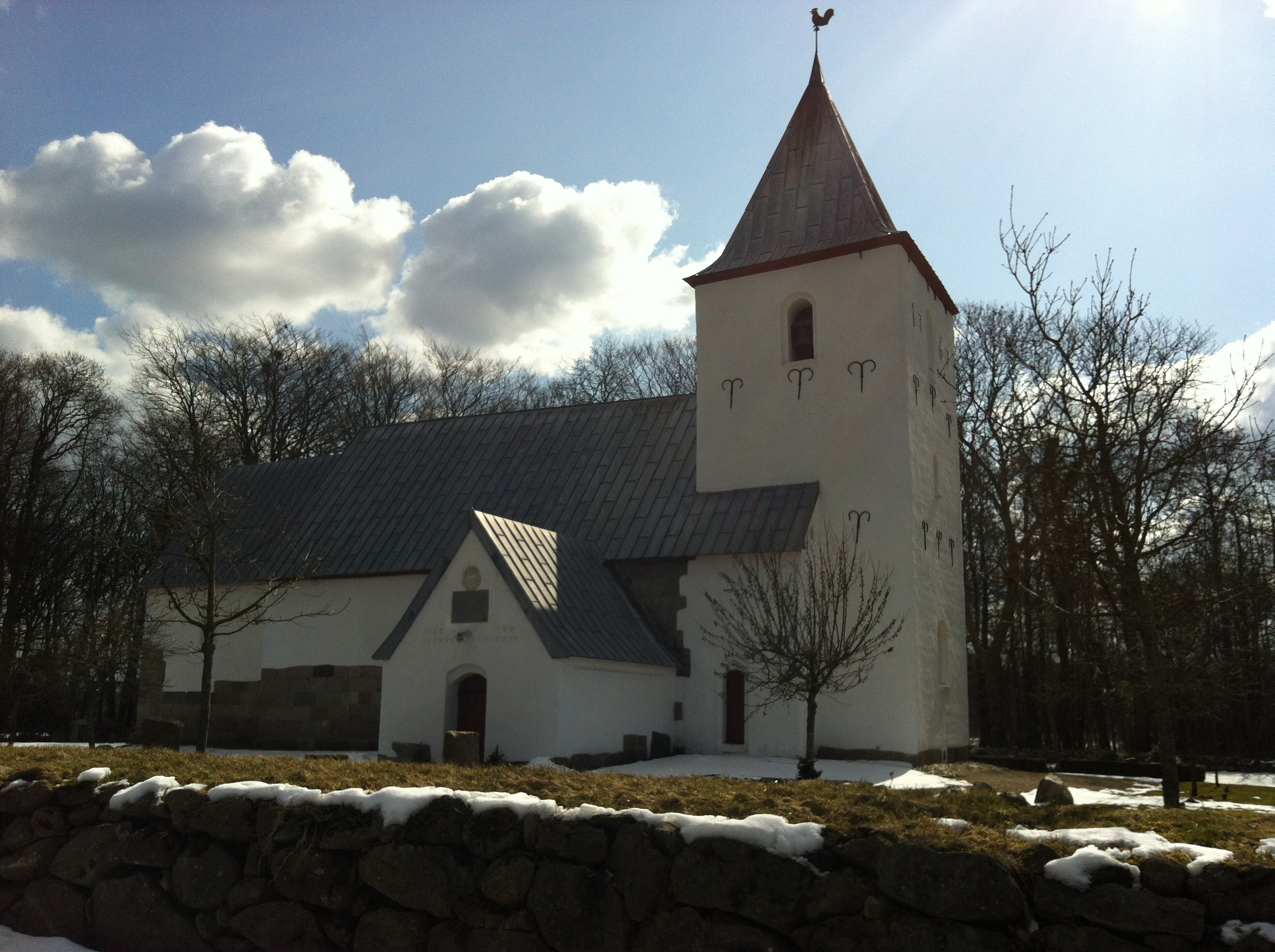 Skt. Knuds kirke i Bramming